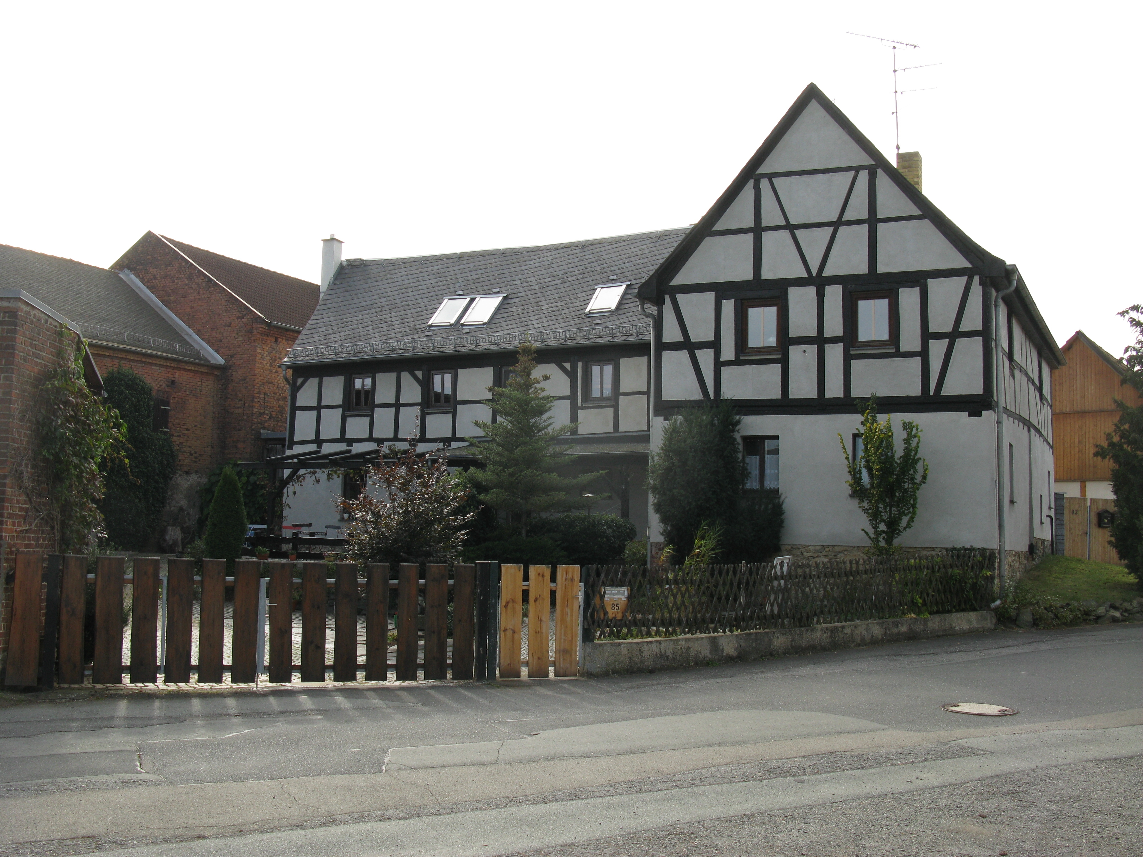 Denkmalgeschütztes Gehöft an der Möschwitzer Straße (Möschwitzer Straße 85) im Plauener, Stadtteil Chrieschwitz